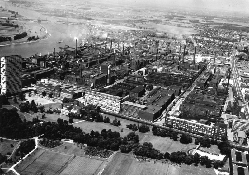 Luftansicht des Werkes Leverkusen der Farbenfabriken Bayer